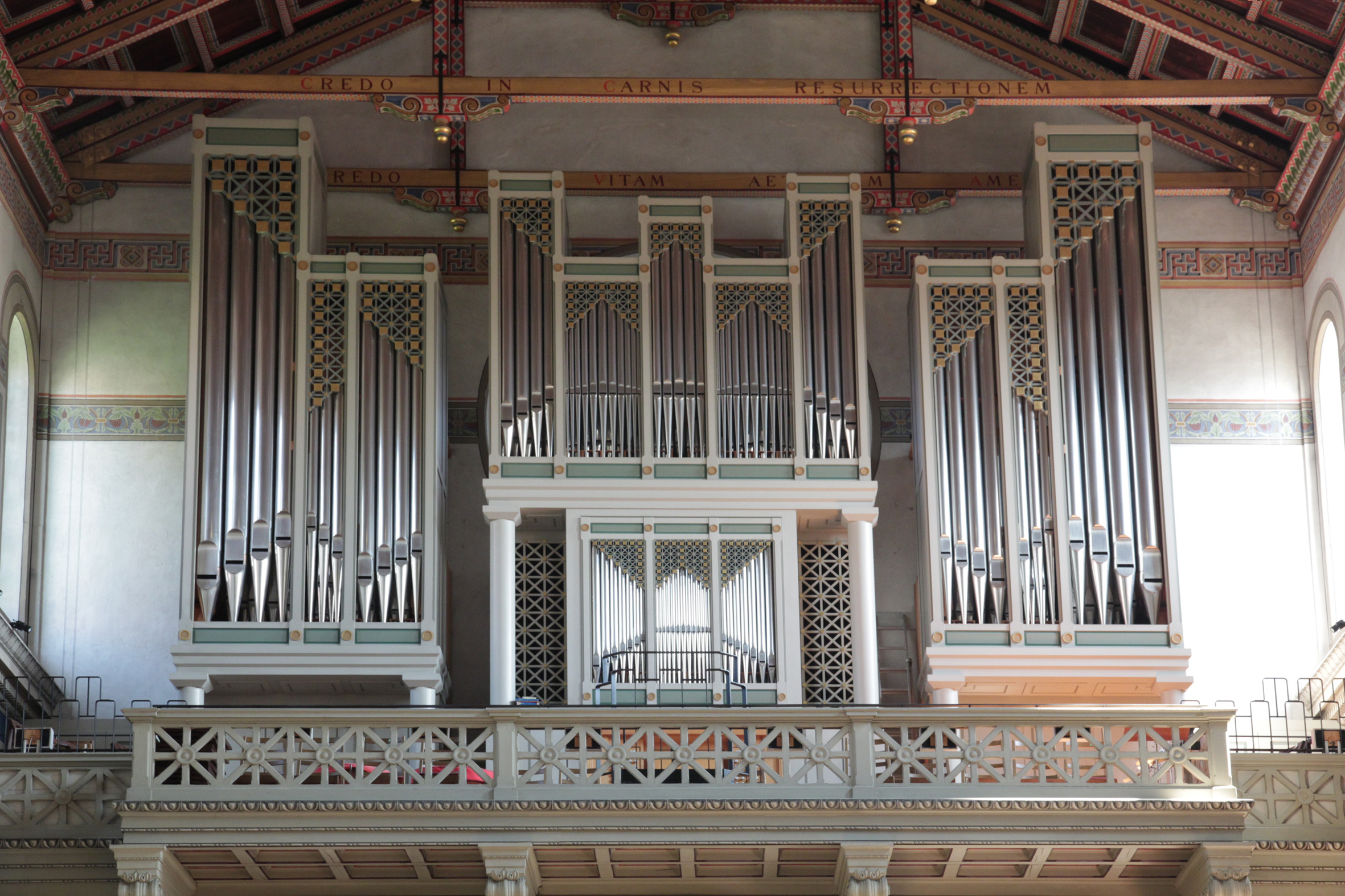 Römisch-katholische Kirche Liebfrauen Zürich